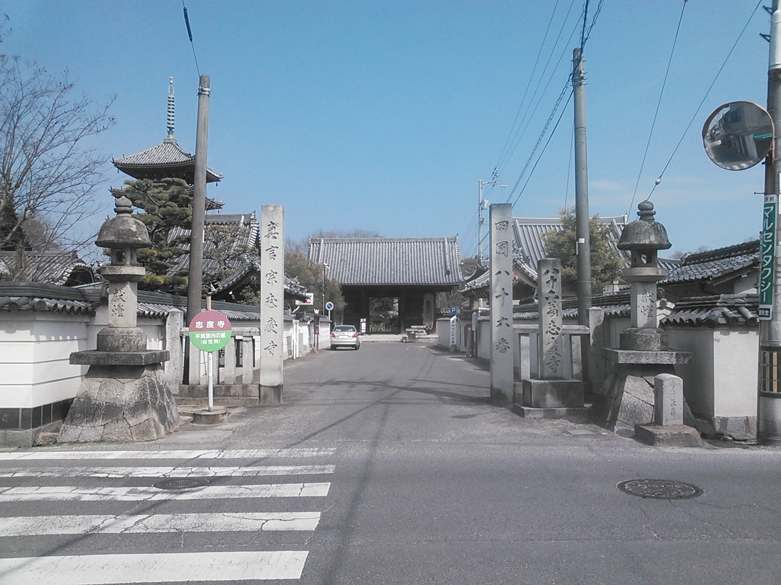 四国八十八箇所八十六番志度寺石門前。塔頭寺院を含む導入路の前景。